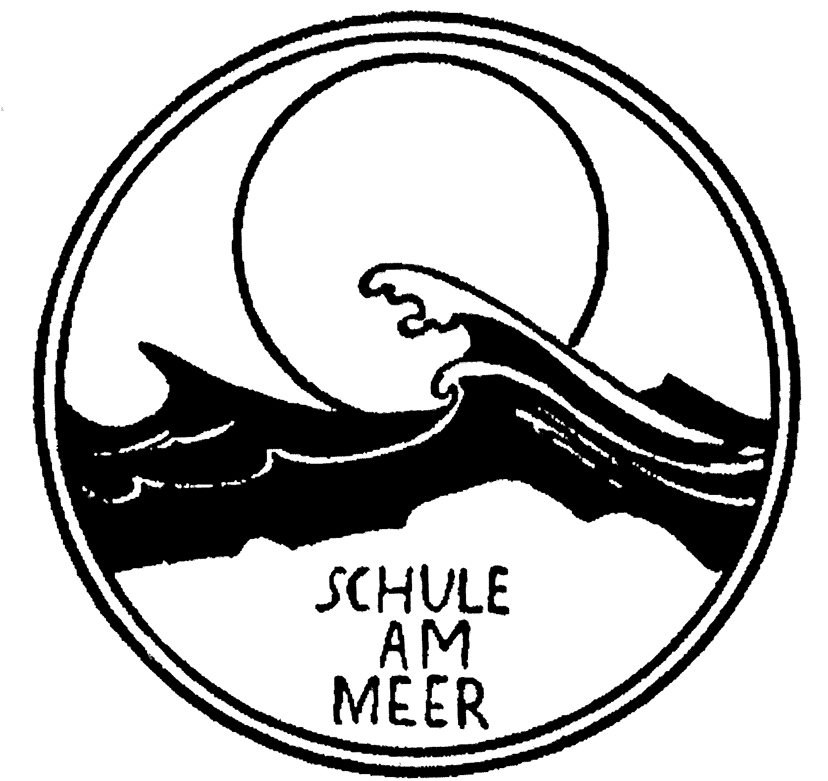 Version der früheren Bildmarke des reformpädagogischen Landerziehungsheims Schule am Meer (1925–1934) auf der deutschen Nordseeinsel Juist. – „Erziehung durch die See“ war das Motto des Schulgründers Martin Luserke (1880–1968), „Lebensbildung“, eine am realen Leben orientierte Bildung, wollte er seinen Schülern bieten. Die Auseinandersetzung mit der Natur gehörte demzufolge zum Schulalltag. Im Logo der Schule wird dies visualisiert, es vermittelt den Eindruck steter Aktivität und Veränderung. Es existierten diverse Varianten dieses Logos. Die hier gezeigte enthält den in Versalien ausgeführten Namen der Schule in einer weder zentrierten noch links- oder rechtsbündigen Anordnung.